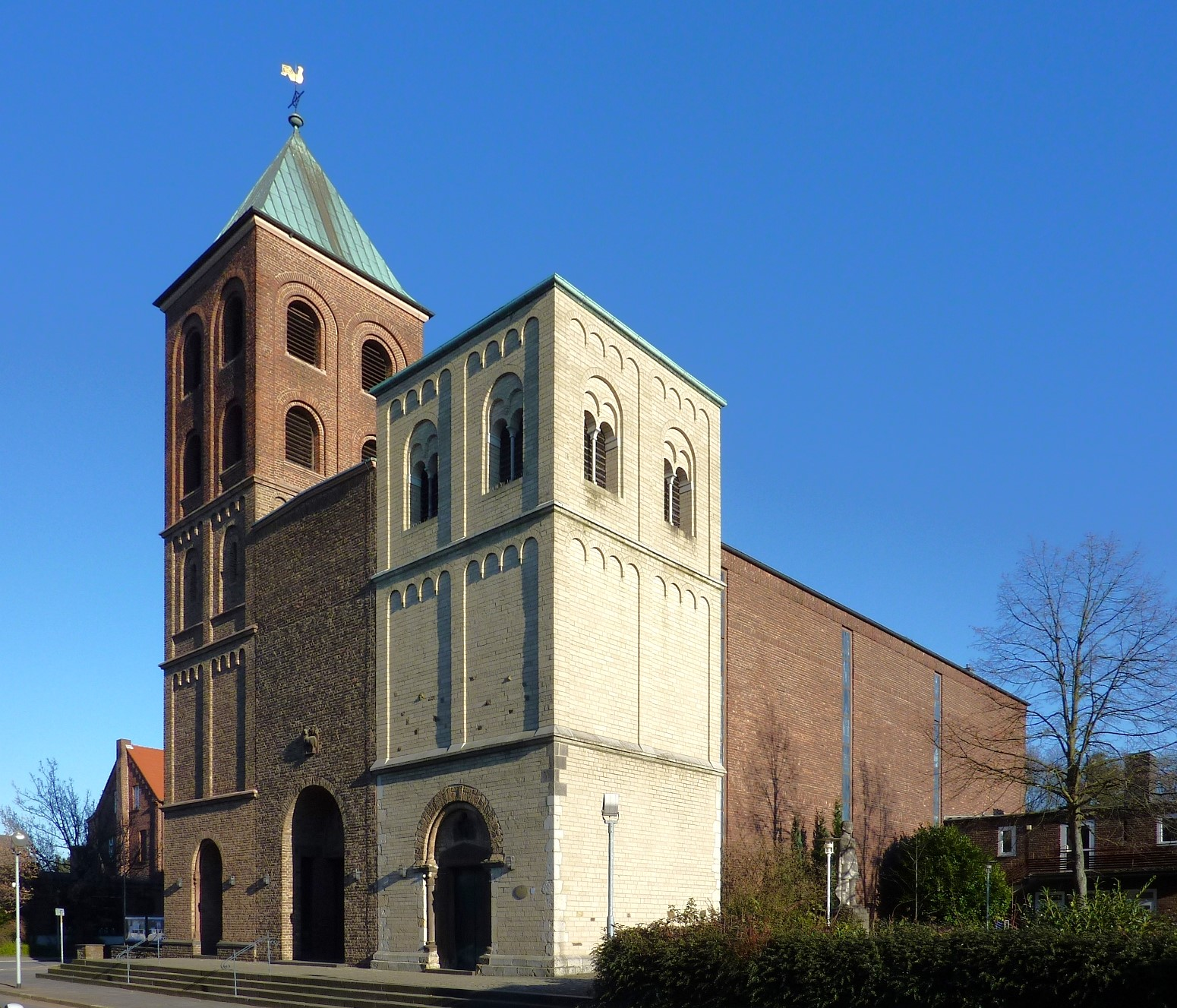 St. Stephanus Leverkusen-Bürrig